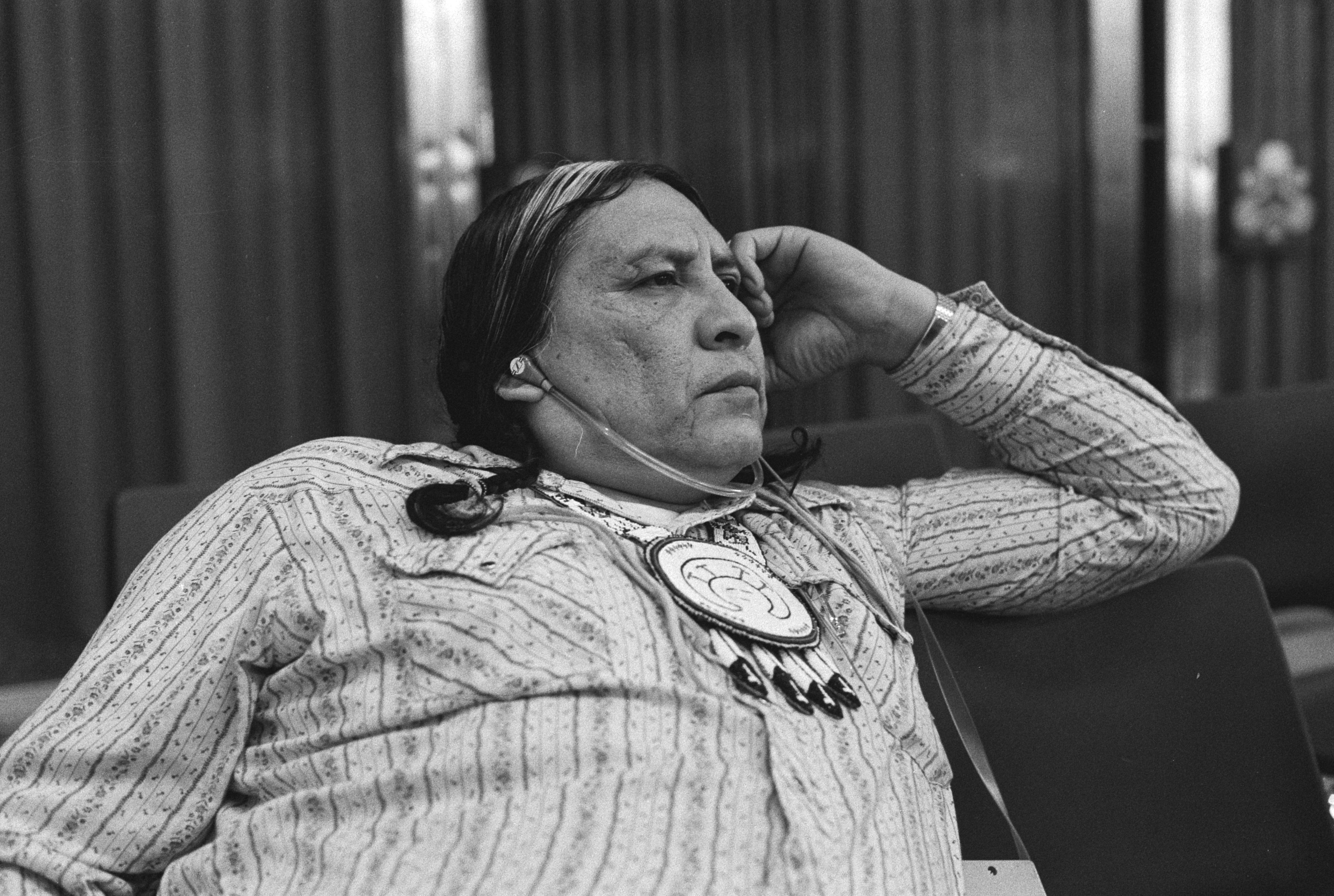 Collectie / Archief : Fotocollectie Anefo Reportage / Serie : [ onbekend ] Beschrijving : Vierde Russel Tribunaal over rechten Indianen in Amerika in De Doelen te Rotterdam, Sioux-indiaan Archie Fire Lame Deer tijdens tribunaal Datum : 24 november 1980 Locatie : Rotterdam, Zuid-Holland Trefwoorden : INDIANEN Instellingsnaam : Doelen, De, Russell-Tribunaal Fotograaf : Bogaerts, Rob / Anefo Auteursrechthebbende : Nationaal Archief Materiaalsoort : Negatief (zwart/wit) Nummer archiefinventaris : bekijk toegang 2.24.01.05 Bestanddeelnummer : 931-1662